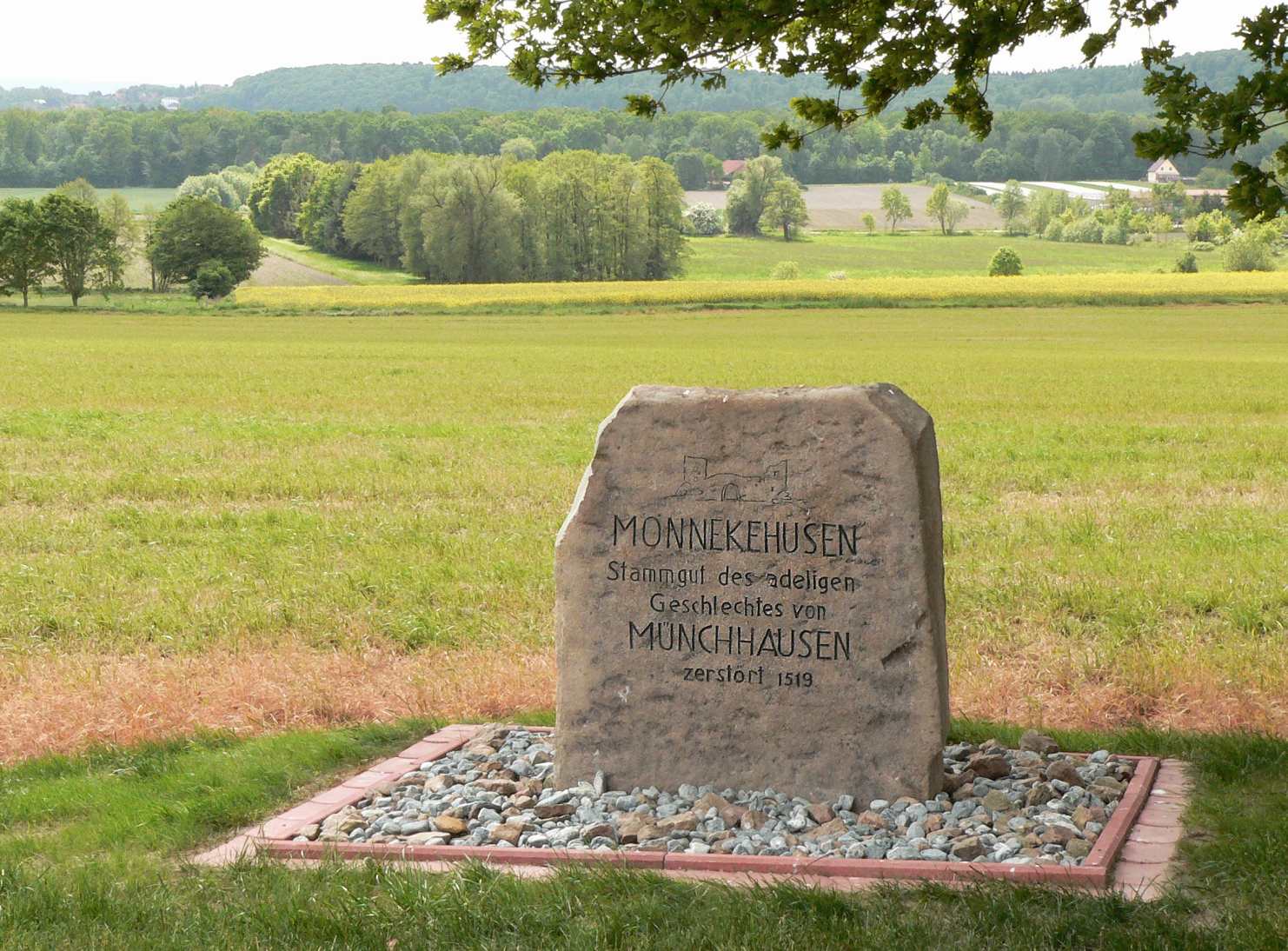 Gedenkstein für die "Villa Monickhusen" am Haarberg, 1335 zum letzten Mal als bewohnte Siedlung erwähnt. Der Stein befindet sich nicht am tatsächlichen Ort der Siedlung